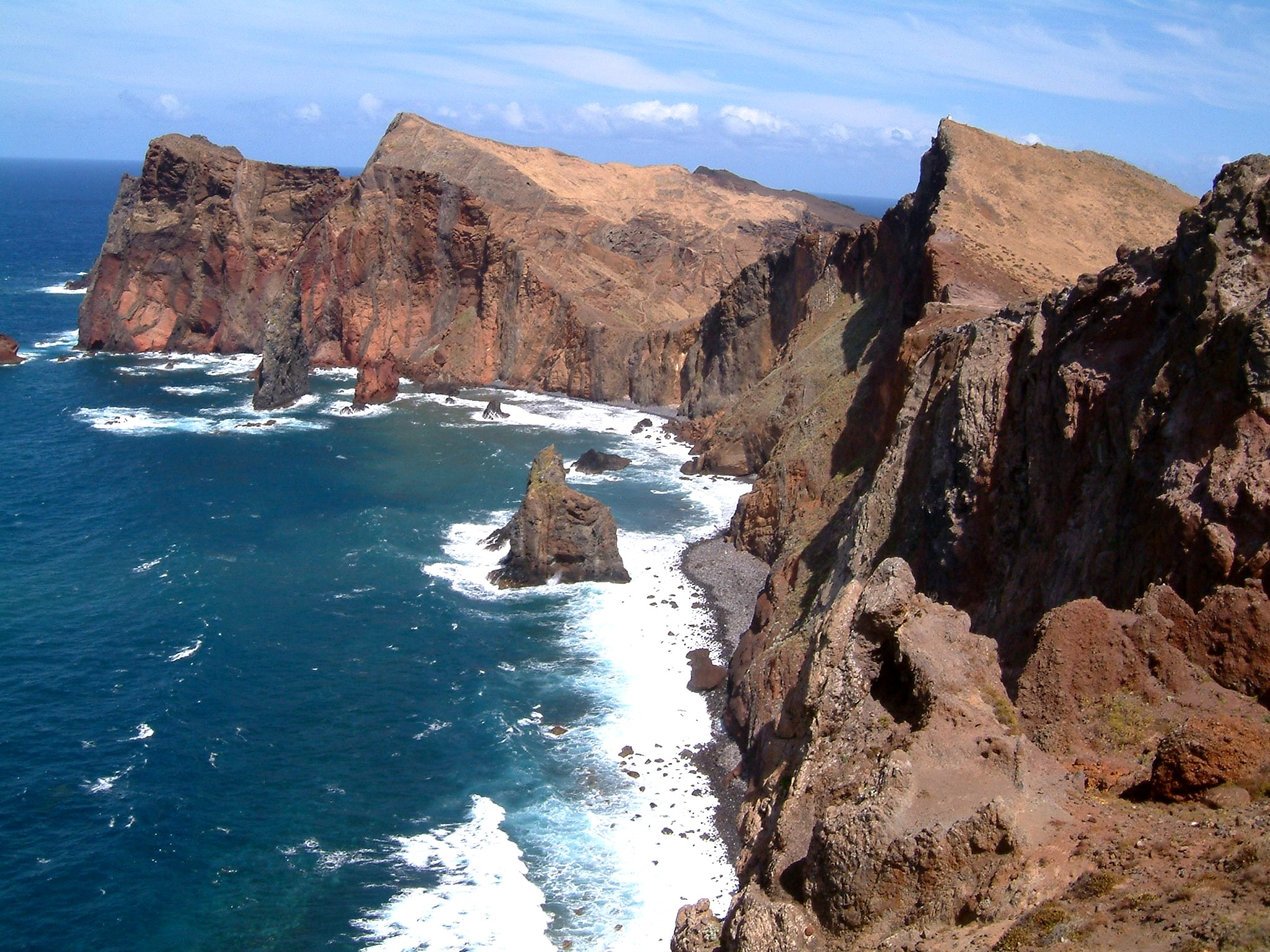 Madeira_Ostküste_Mai-07. Photograph: Peggy